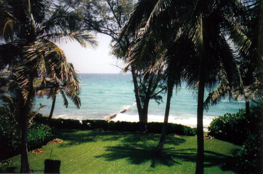 Palm Beach - widok na plażę. Zdjęcie mojego autorstwa. (Piotr Domaradzki)